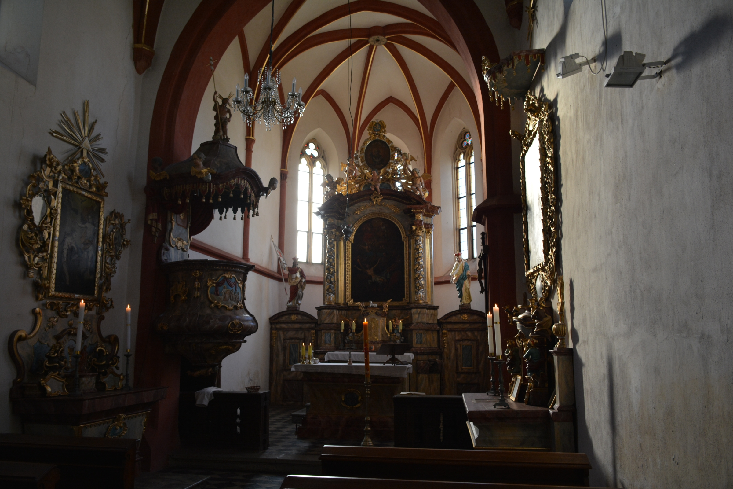 interiér